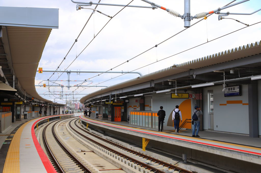 MinamiSuita_home